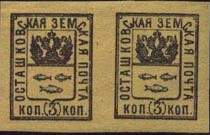 Марка земской почты Осташковского уезда (номинал 3 копейки), выпускались с 1878 года.